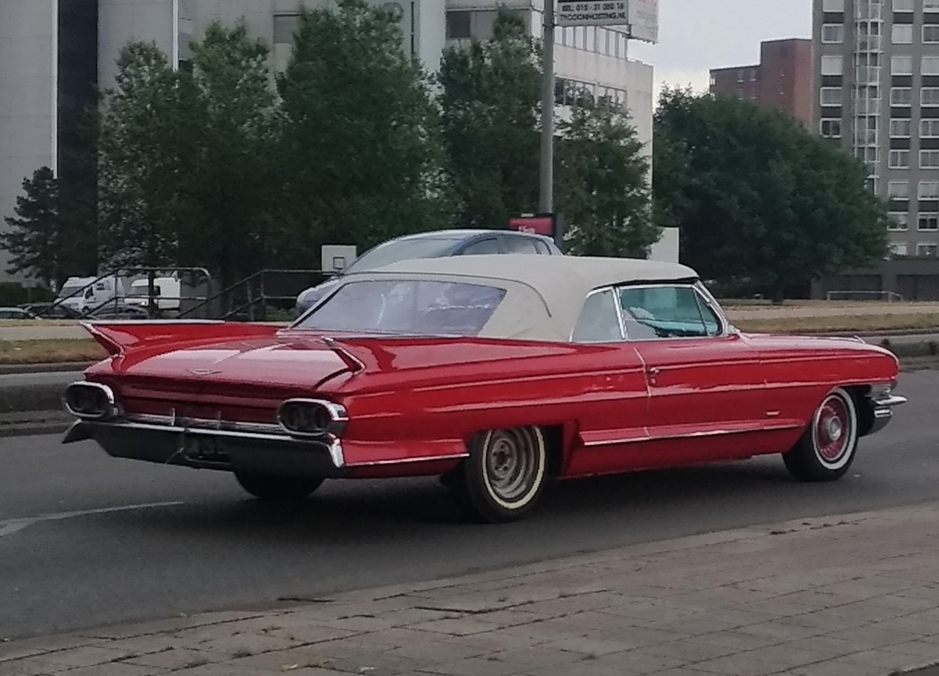 Cadillac Eldorado at Rotterdam